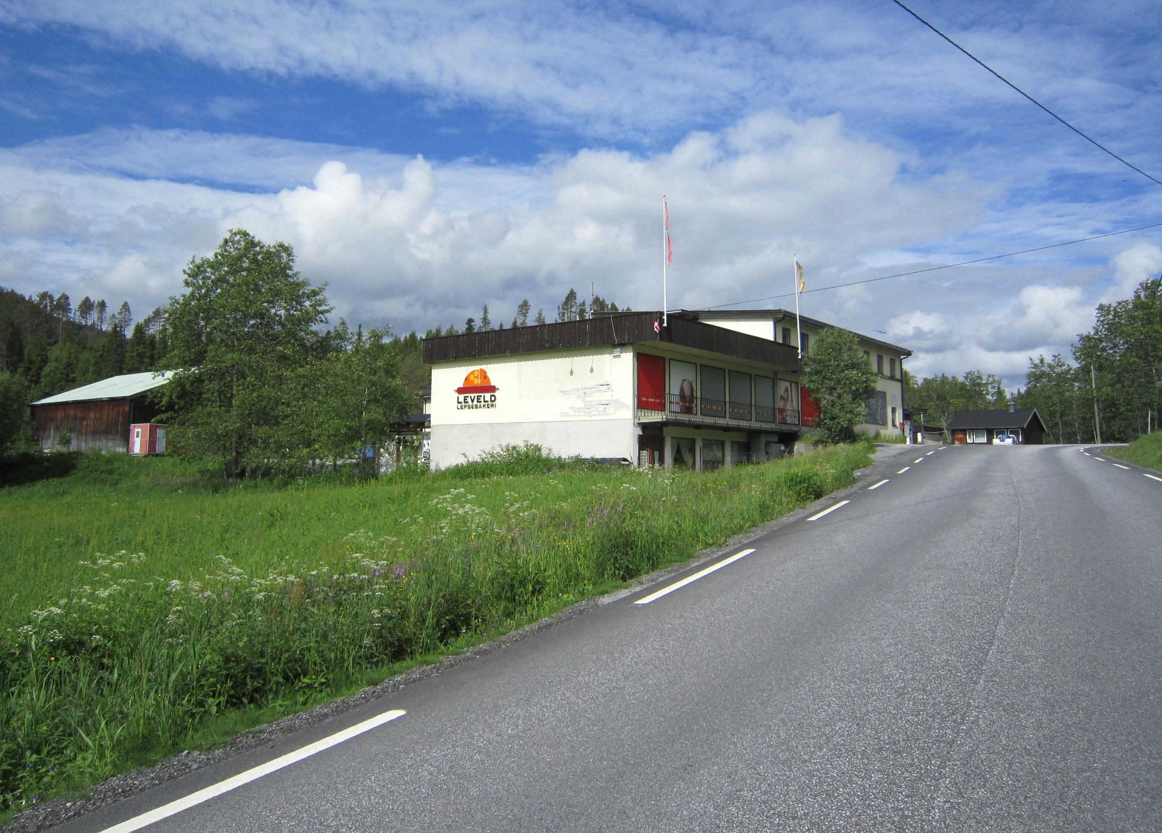 Leveld lefsebakeri ved fylkesvei 244